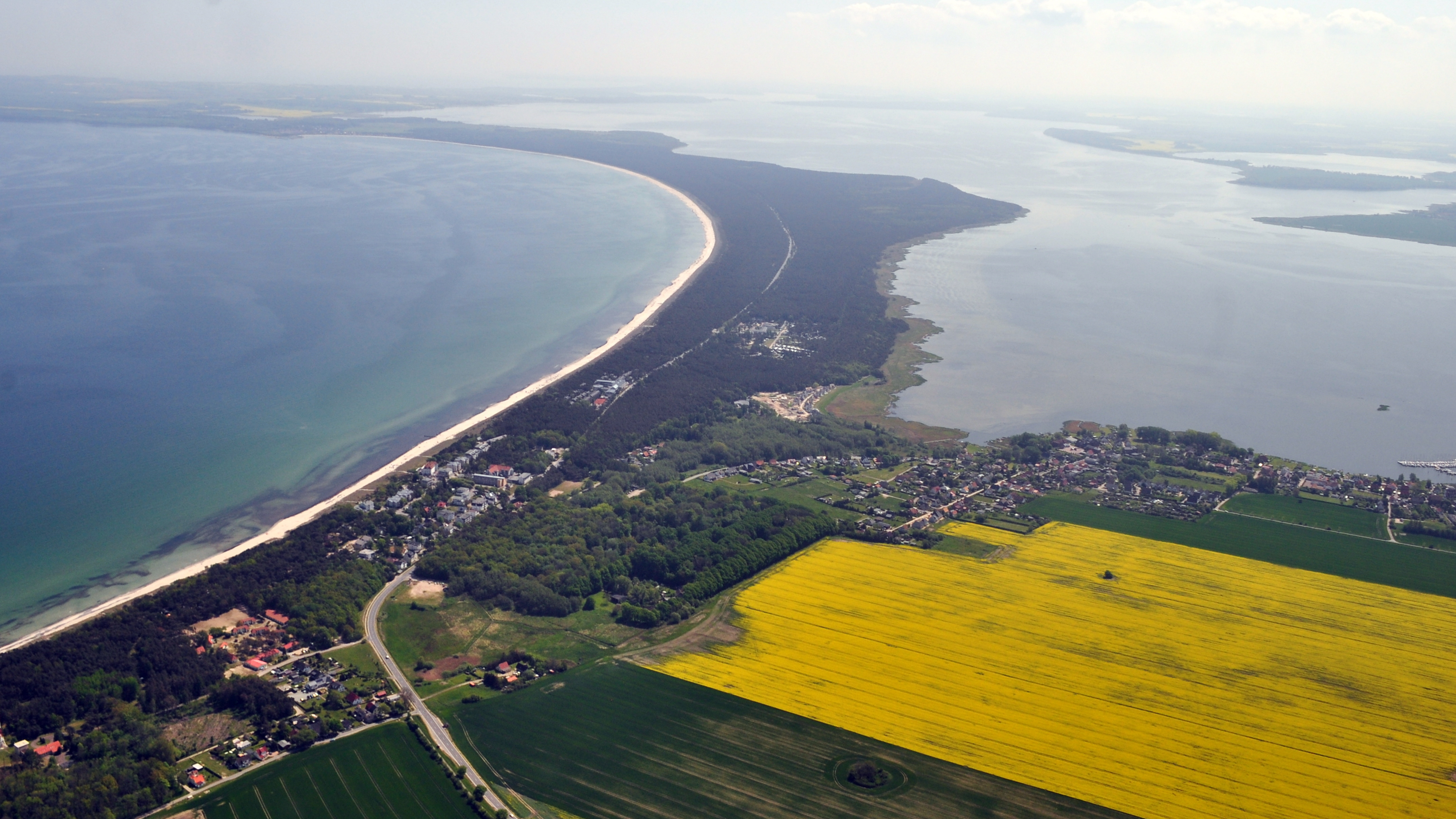 Die Bilder wurden von mir während eines einstündigen Rundflugs ab Flugplatz Güttin am 21. Mai 2011 aufgenommen. Die Bildbeschreibung steht im Dateinamen. Aufgenommen mit einer Nikon D5000 durch das Seitenfenster des Flugzeugs.